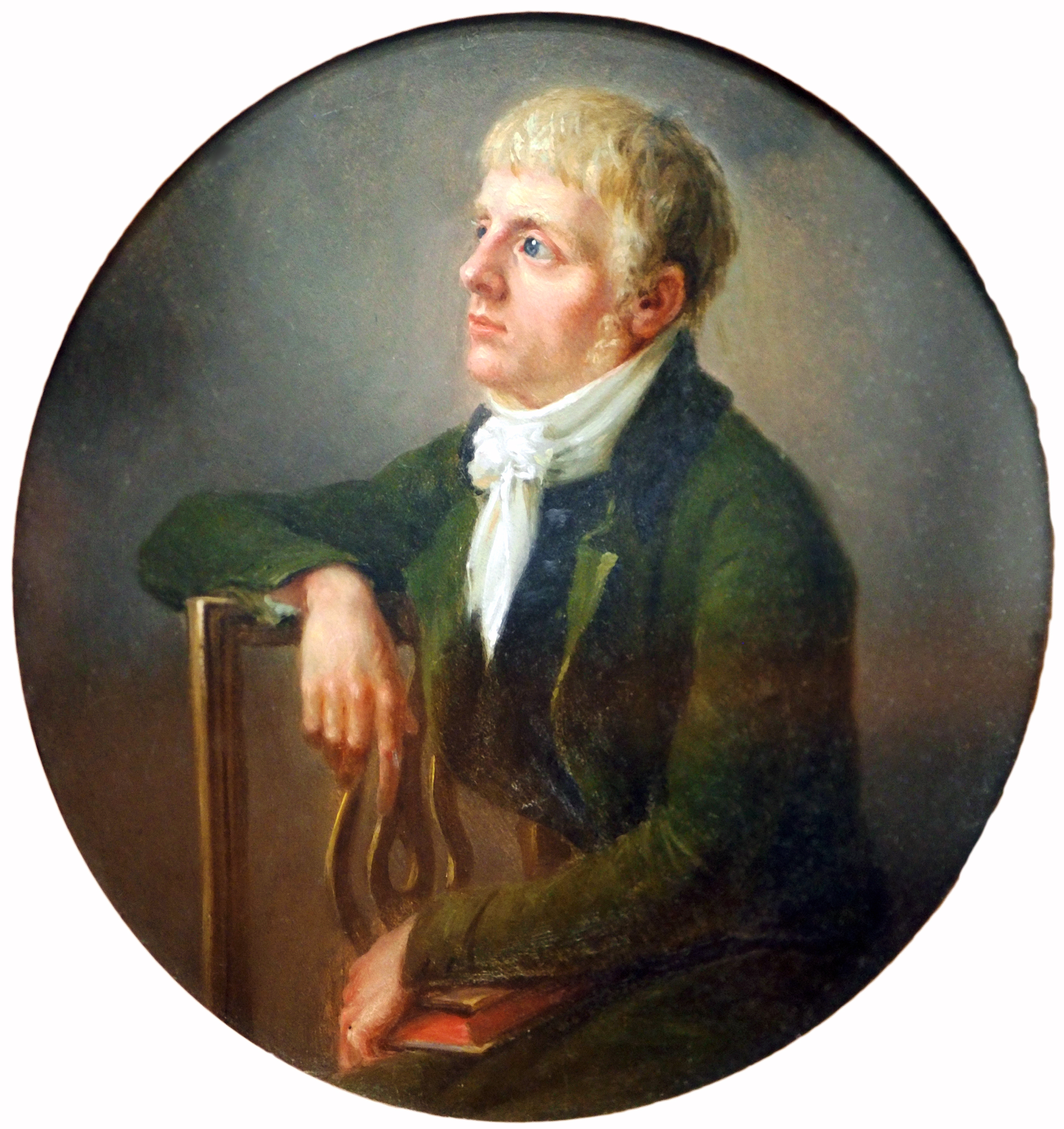 Medaillon-Bildnis des jungen Caspar David Friedrich